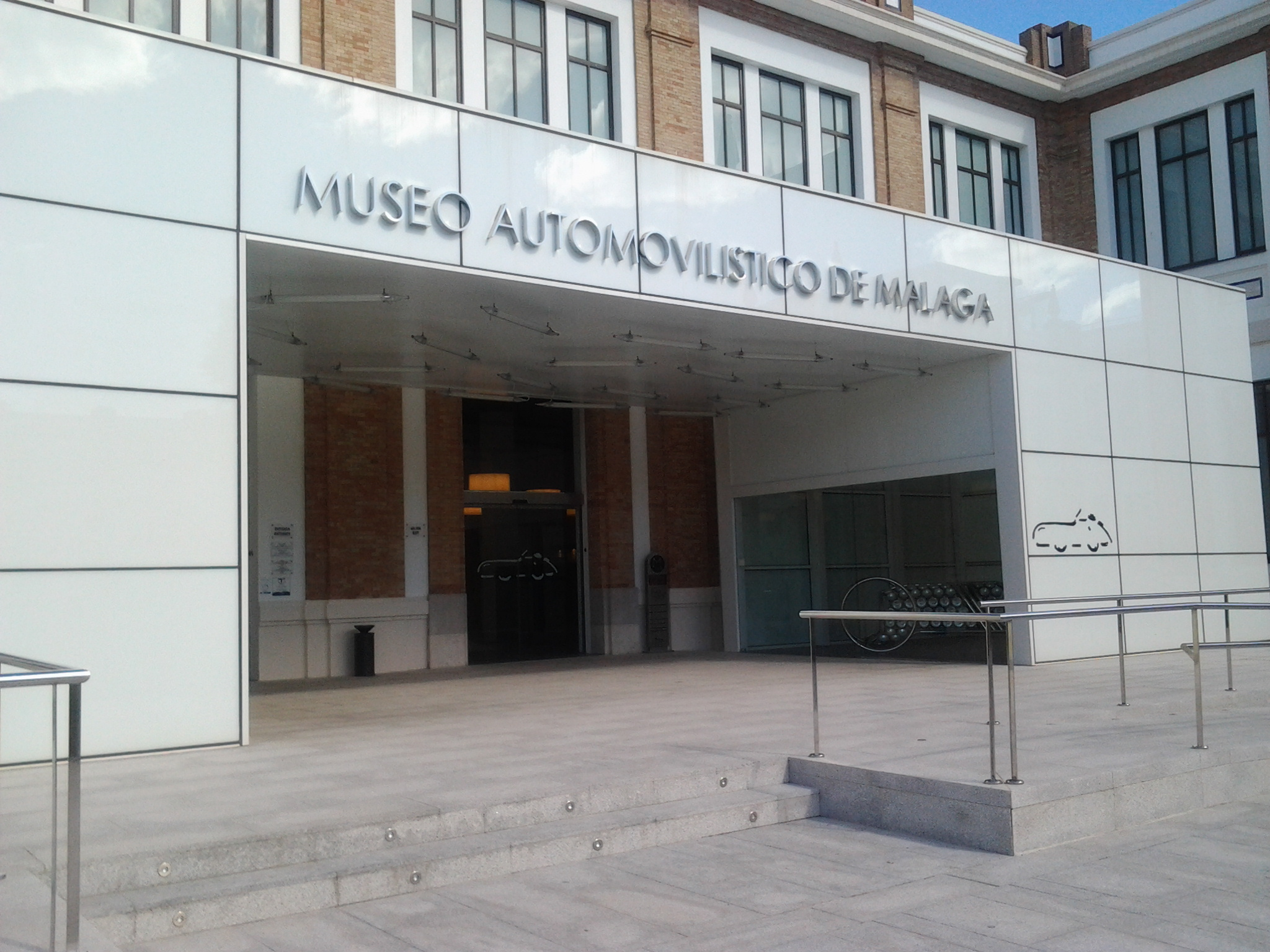 Málaga. Museo automovilistico.